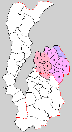 滋賀県野洲郡の町村制時点の町村。